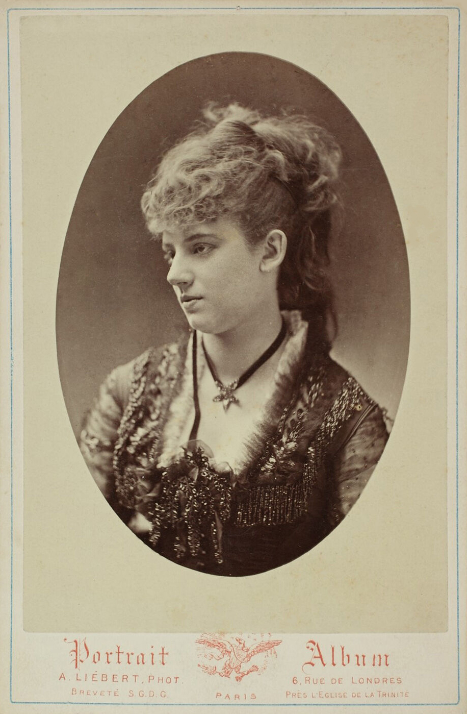 Sophie Croizette photographiée par Alphonse Liébert.